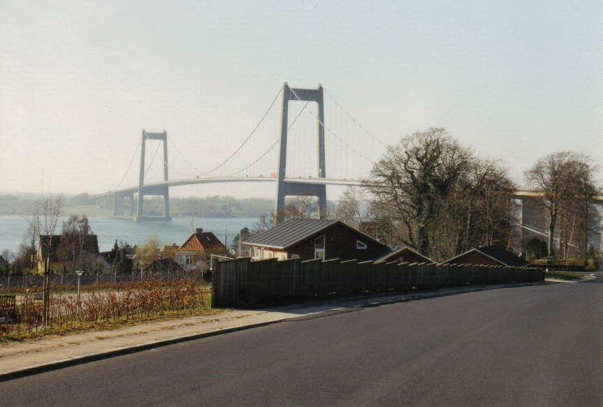 Autobahnbrücke über den Kleinen Belt von der Ortschaft Middelfart auf Fünen aus, 4. April 2002. Aufnahme: Steffen Mokosch